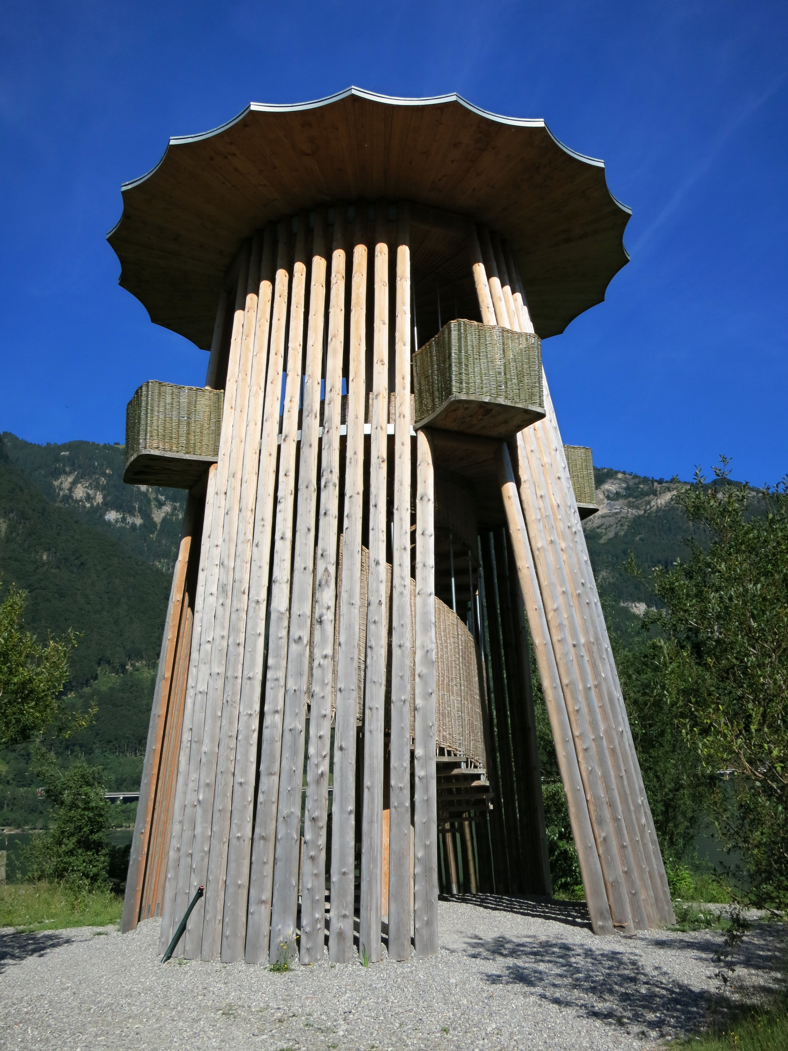 Reussdeltaturm